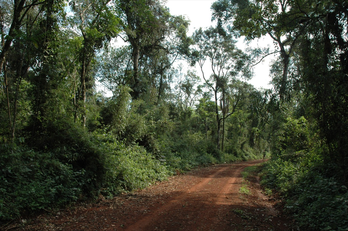 Estrada dentro do Parque Estadual do Turvo.